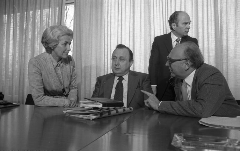 FDP-Bundesvorstand tagt im Bundeshaus